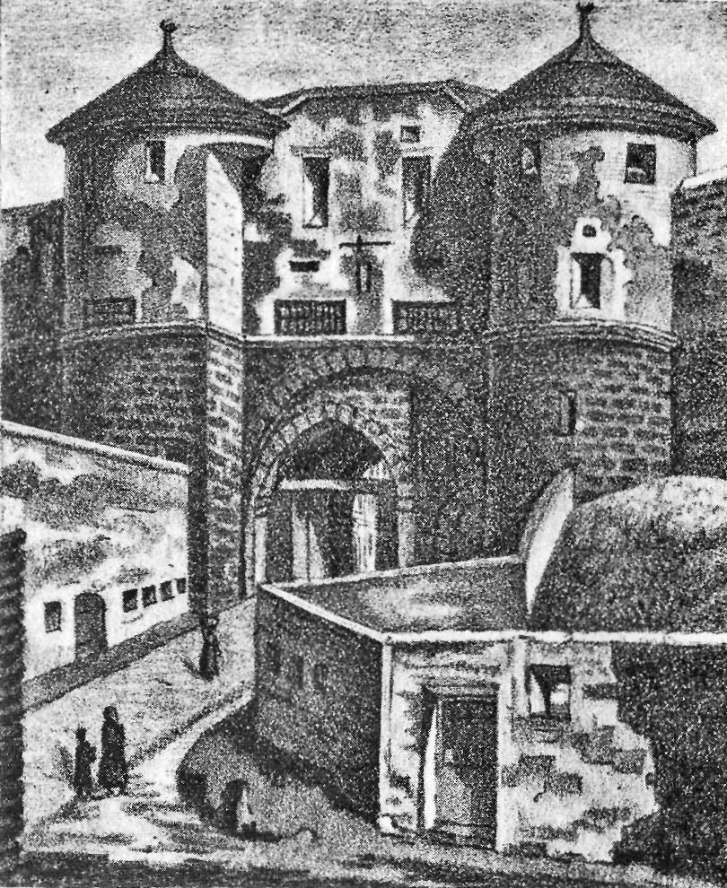 Ehrentor, Köln 19. Jahrhundert. Feldseite